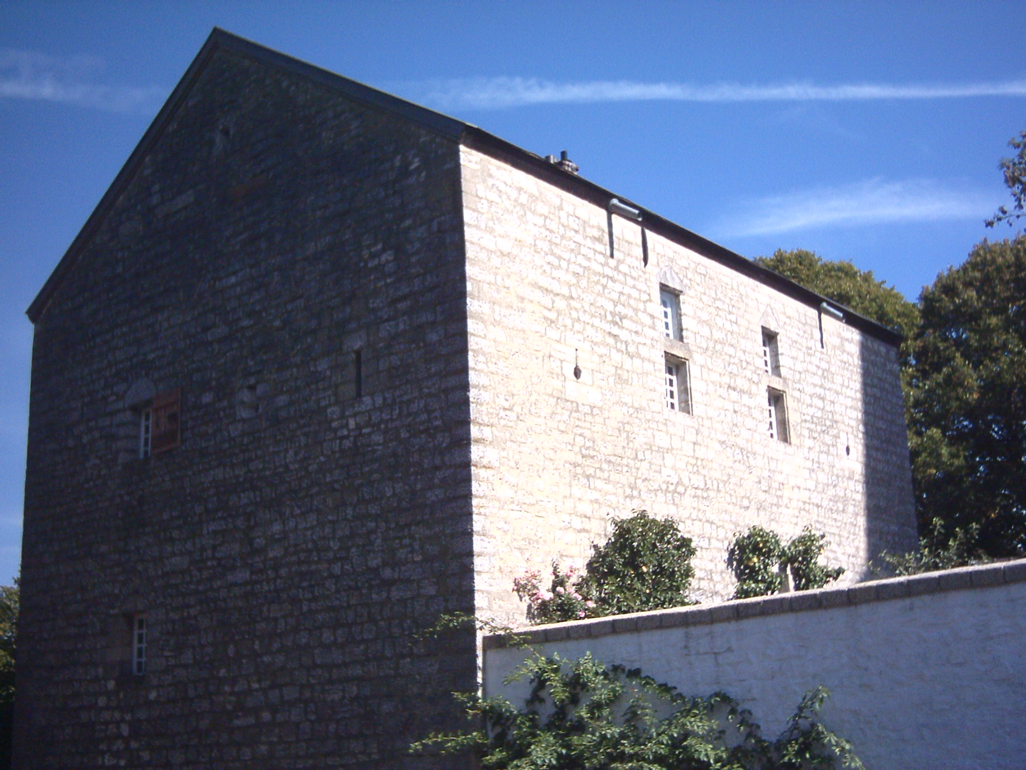 Aachen, Burg Orsbach